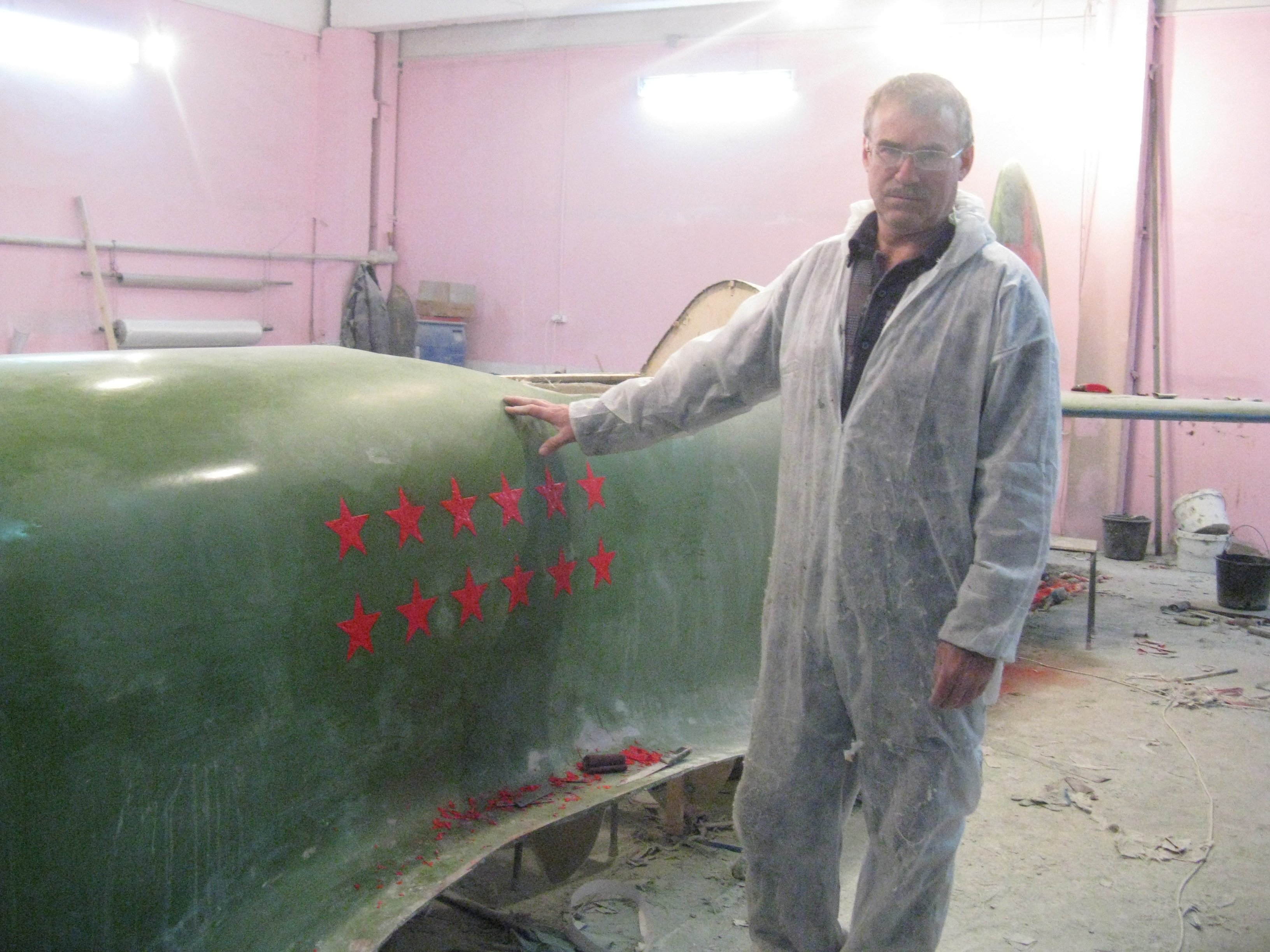 Один из конструкторов памятника «Яку-7Б» у своего детища.